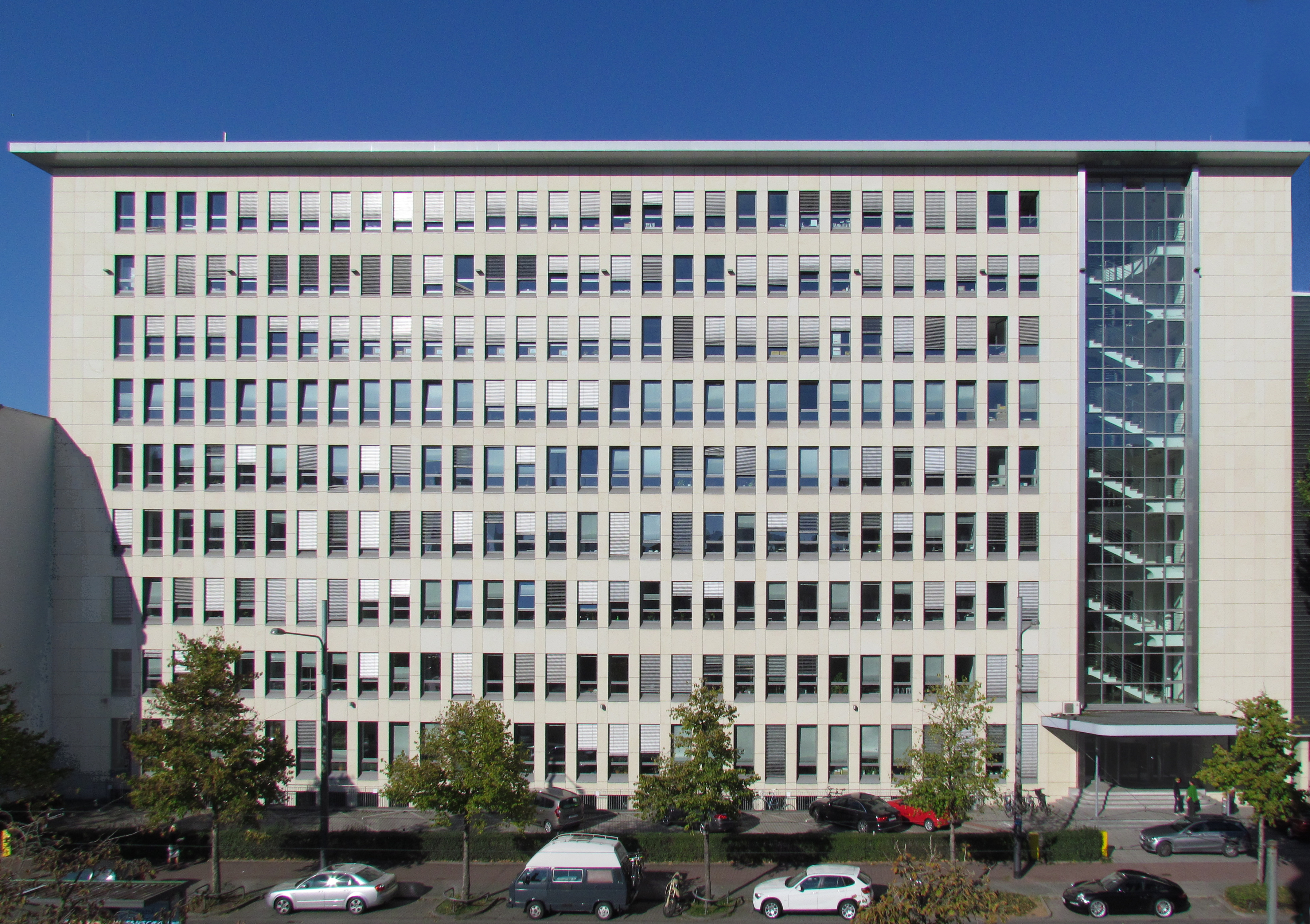 Bildinhalt: Das ehemalige Verwaltungsgebäude der untergegangenen Firma Hartmann & Braun in der Gräfstraße 97, Mieter zur Zeit Investmentbank Equinet, vormals zu 49.9 Prozent der Landesbank Rheinland-Pfalz (LRP) gehörig, dann mehrheitlich der DAH Beteiligungsgesellschaft von Daniel Hopp. Aufnahmeort: Frankfurt am Main, Deutschland